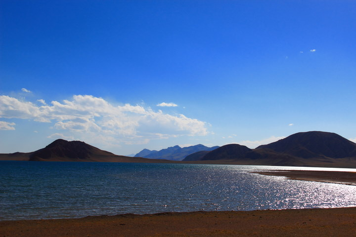 西藏自治区那曲地区吴如错